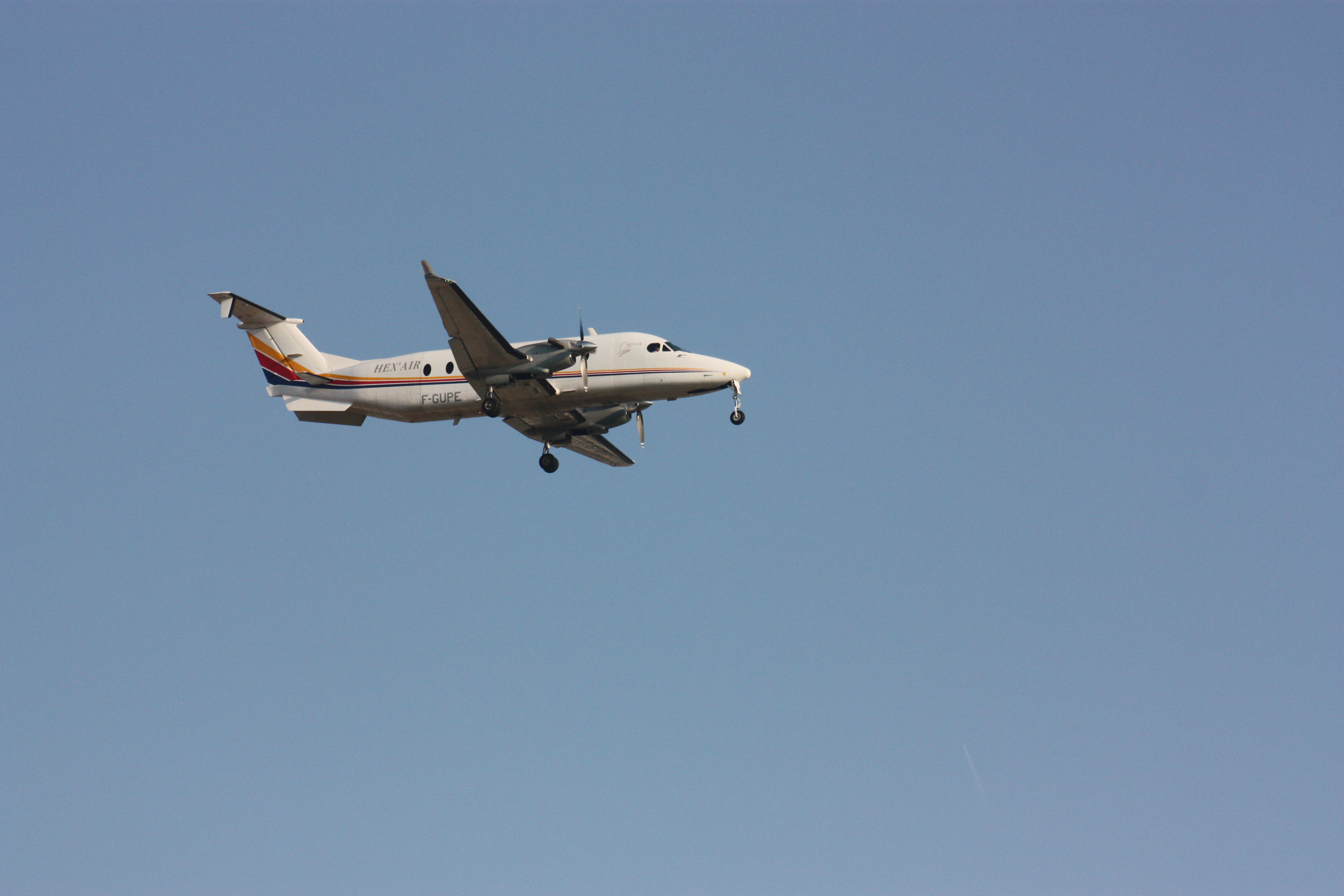 Beechcraft 1900D F-GUPE d'Hex'air en provenance du Puy-en-Velay, en approche finale piste 06 à Orly (LFPO).